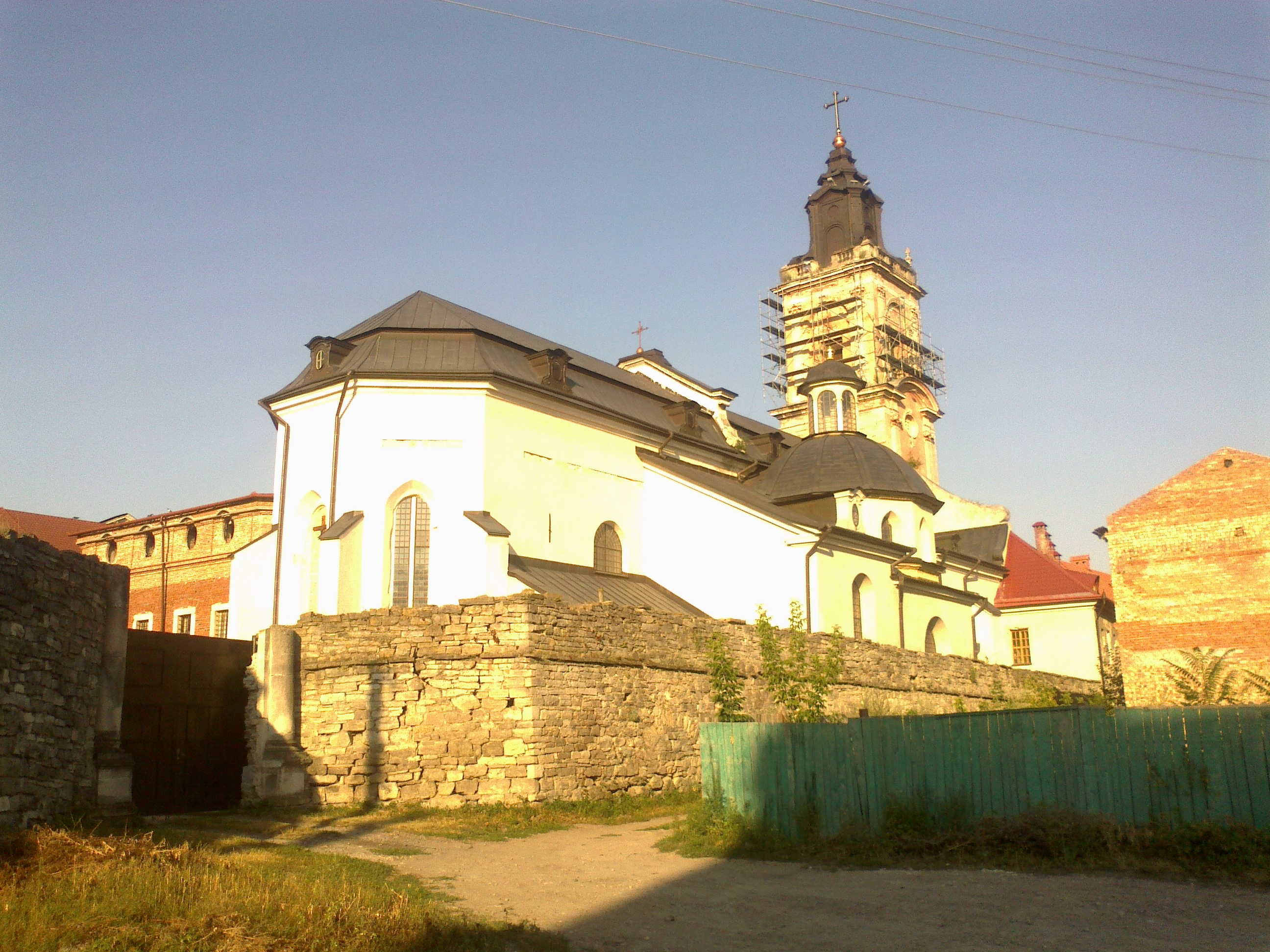 Костел домініканського монастиря у серпні 2012 р.